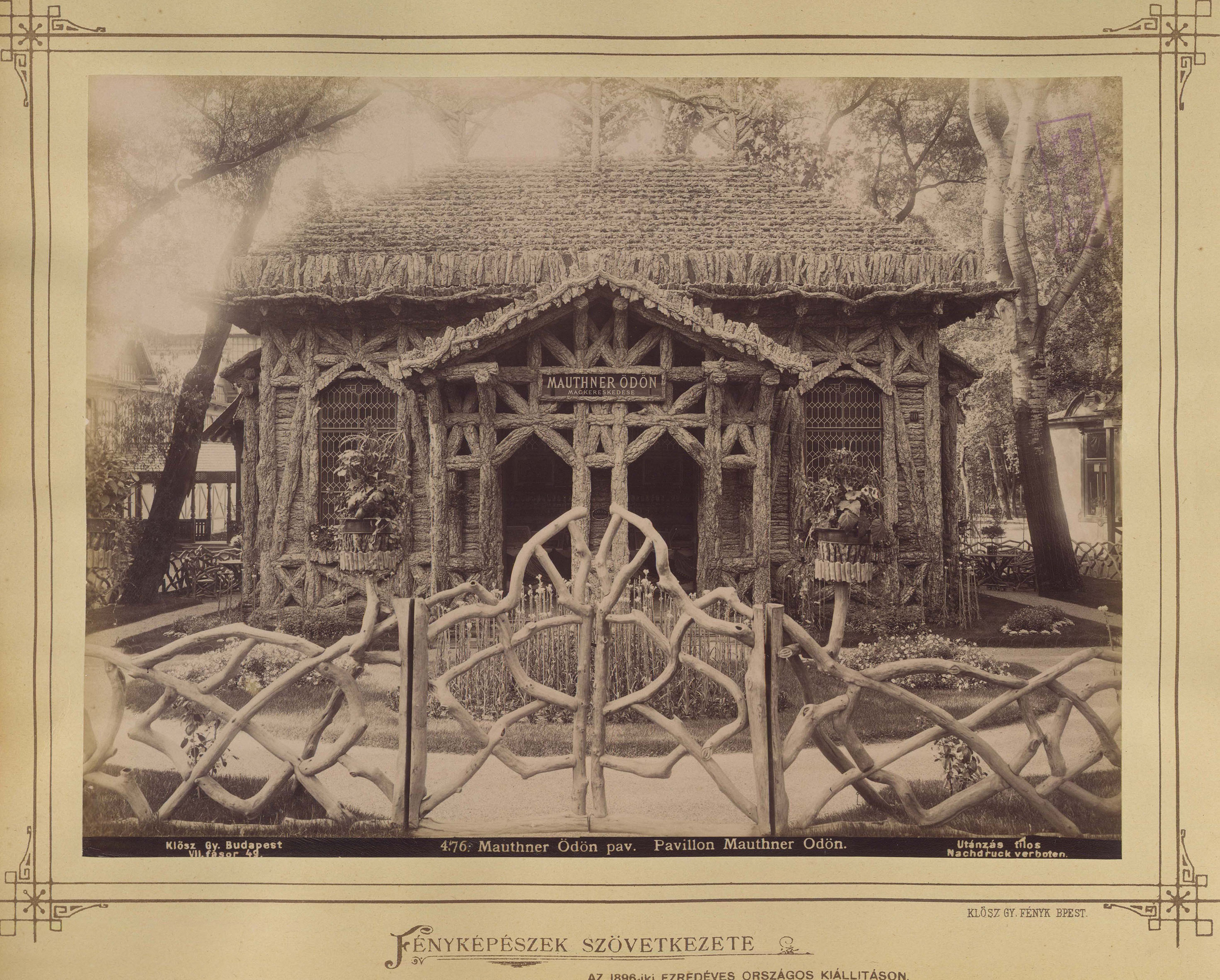 "Millenniumi kiállítás: Mauthner-féle pavilon. A felvétel 1896-ban készült." A kép forrását kérjük így adja meg: Fortepan / Budapest Főváros Levéltára. Levéltári jelzet: HU.BFL.XV.19.d.1.10.049 Location: Hungary, Budapest XIV. Tags: Budapest, Millennium Exhibition